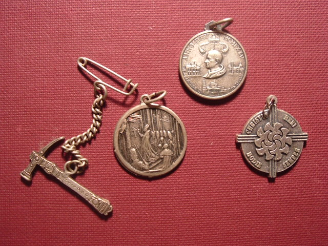 eigen foto